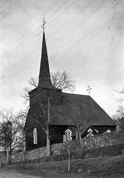 Kyrkan och kyrkogårdsmuren.